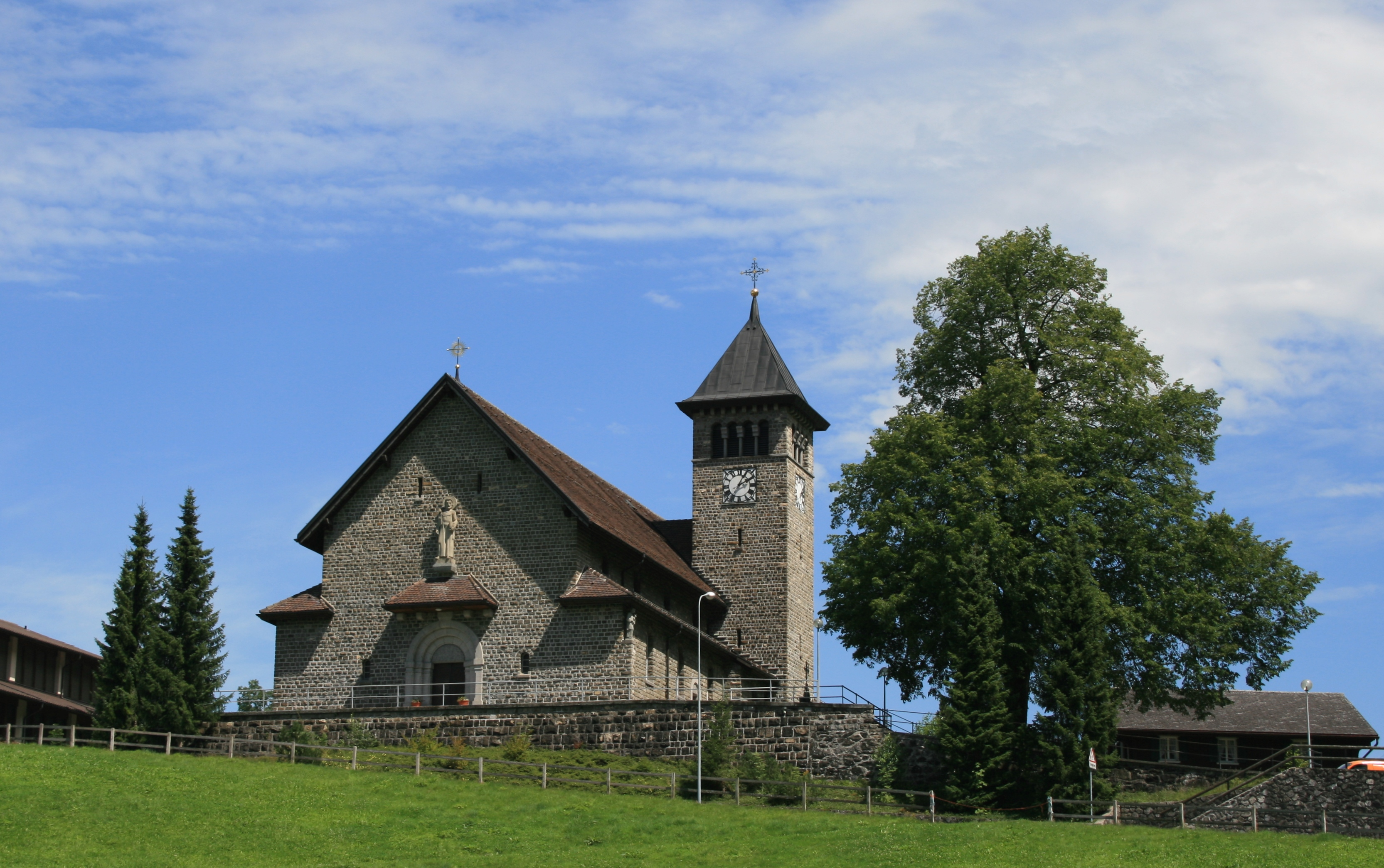 Römisch-katholische Kirche, Emmetten, Kanton Nidwalden